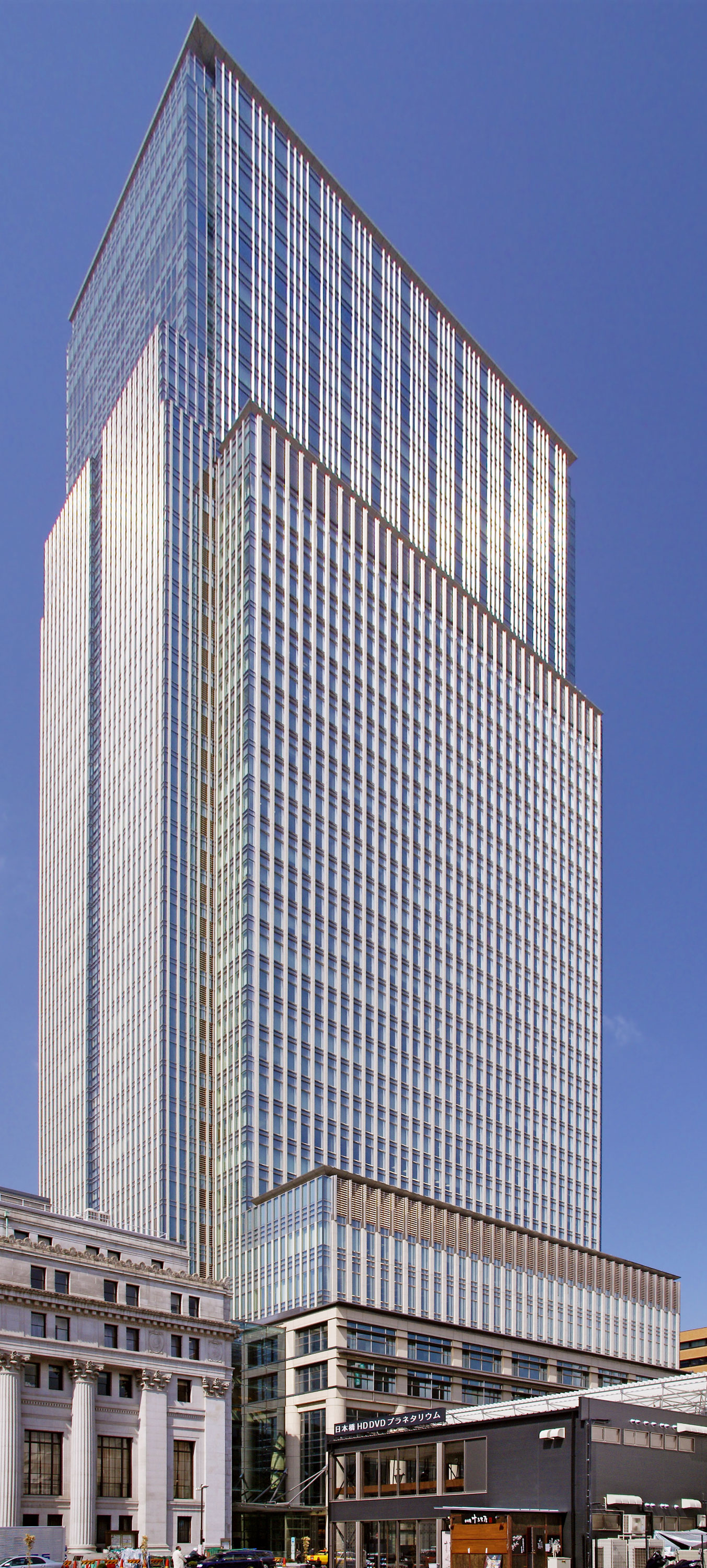 Nihonbashi Mitsui Tower in Chuo-ku, Tokyo, Japan